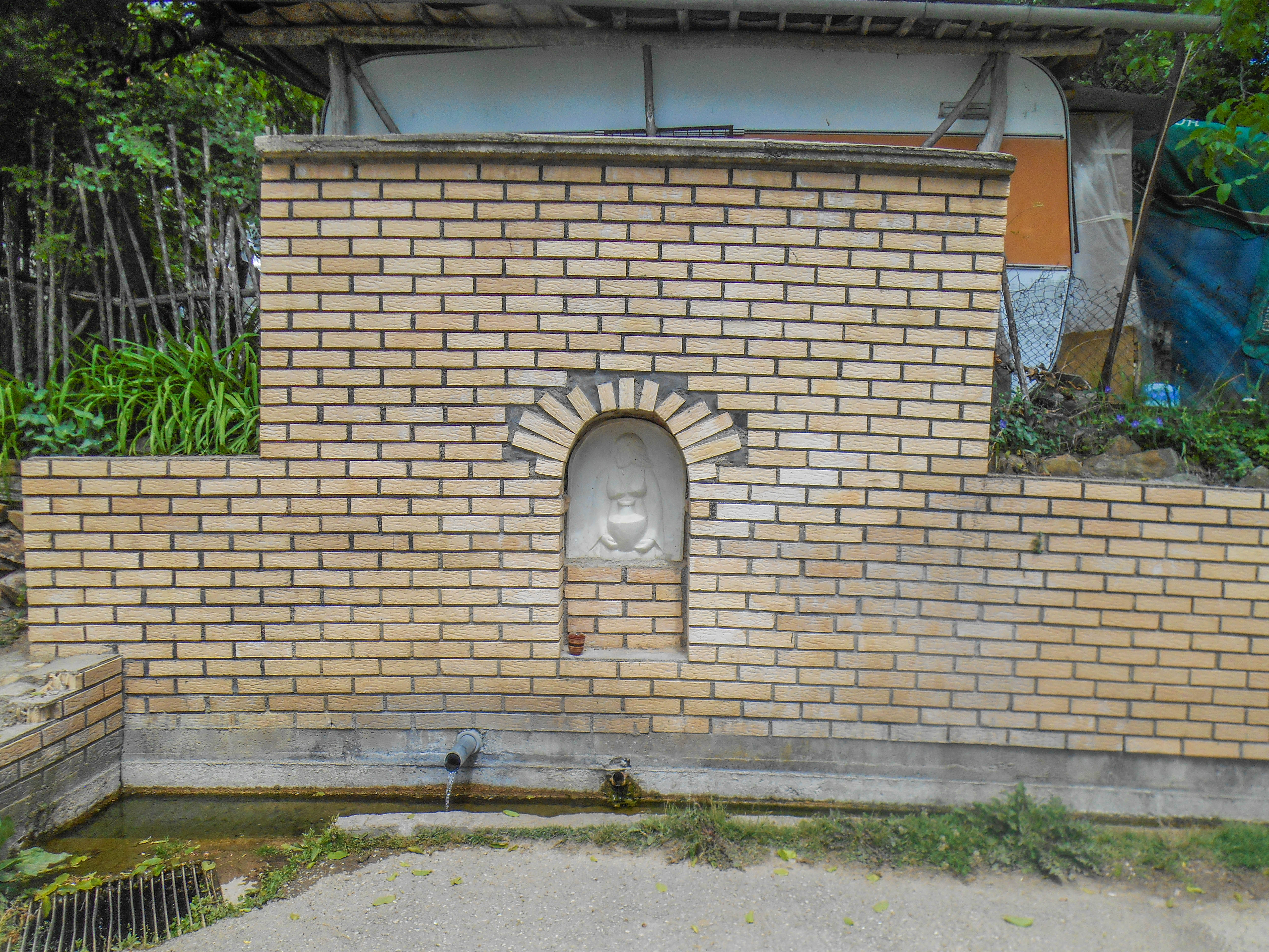 Селска чешма - Требичино